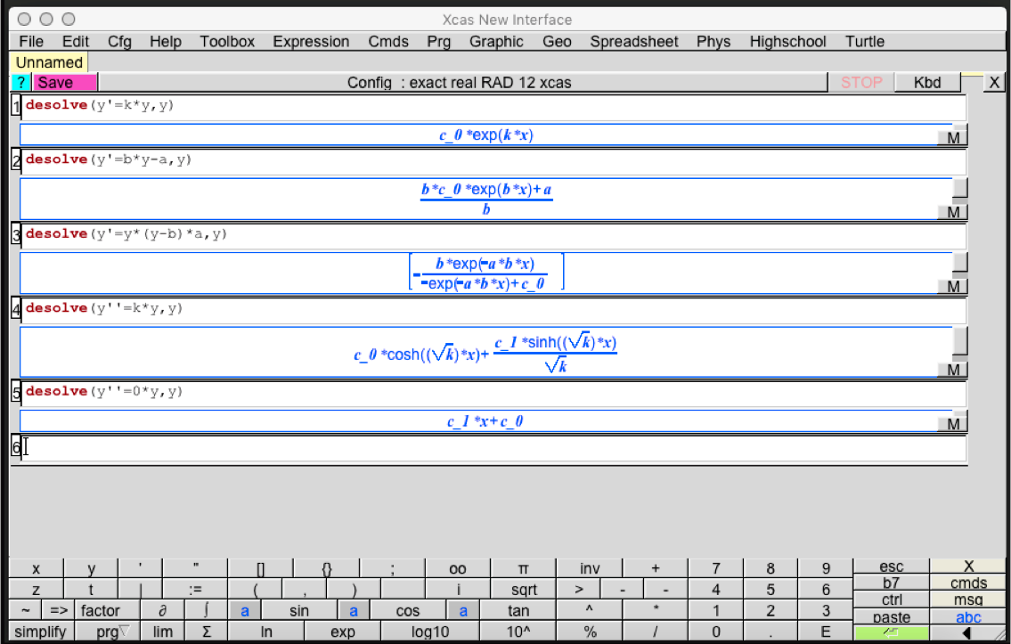 So kann man mit Xcas Differentialgleichungen lösen